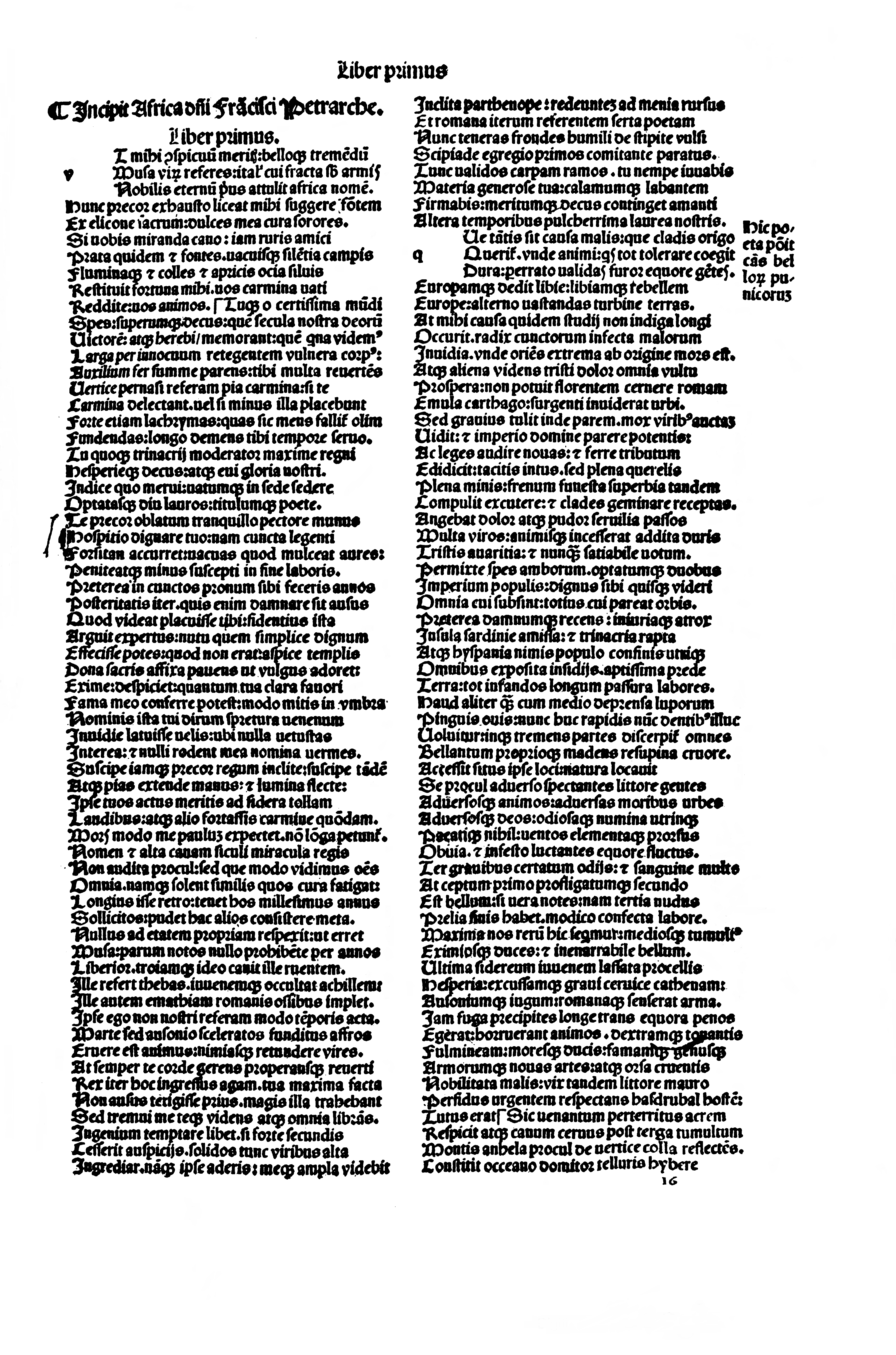 Prima pagina dell'edizione del 1501 dell'Africa di Petrarca